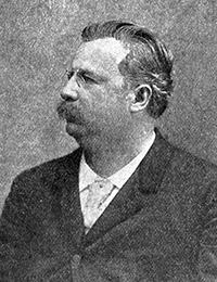 Vilhelm Svedbom (1843–1904). Porträtt i Hvar 8 Dag 1901.